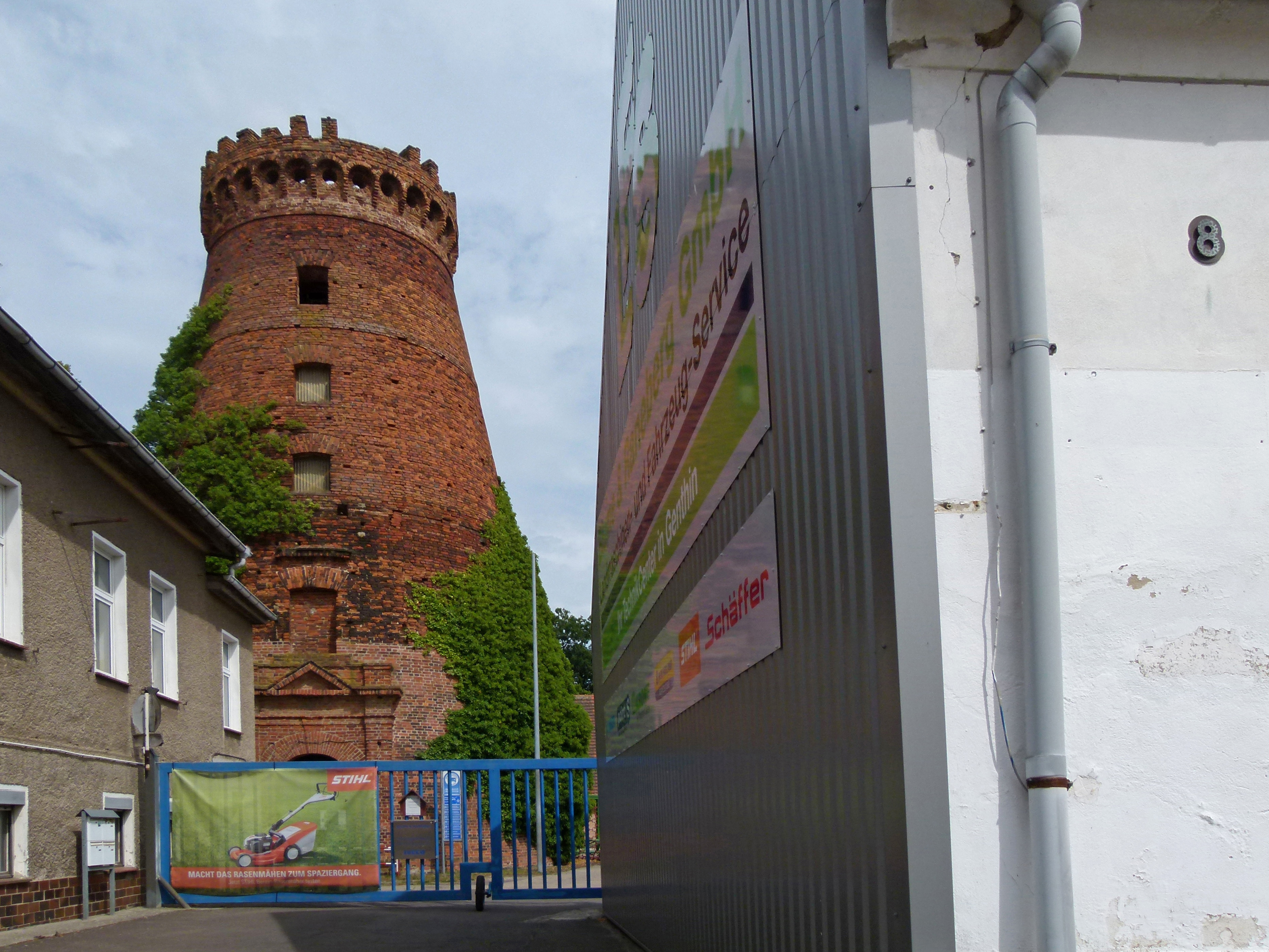 Fabrikstraße 8 in Genthin